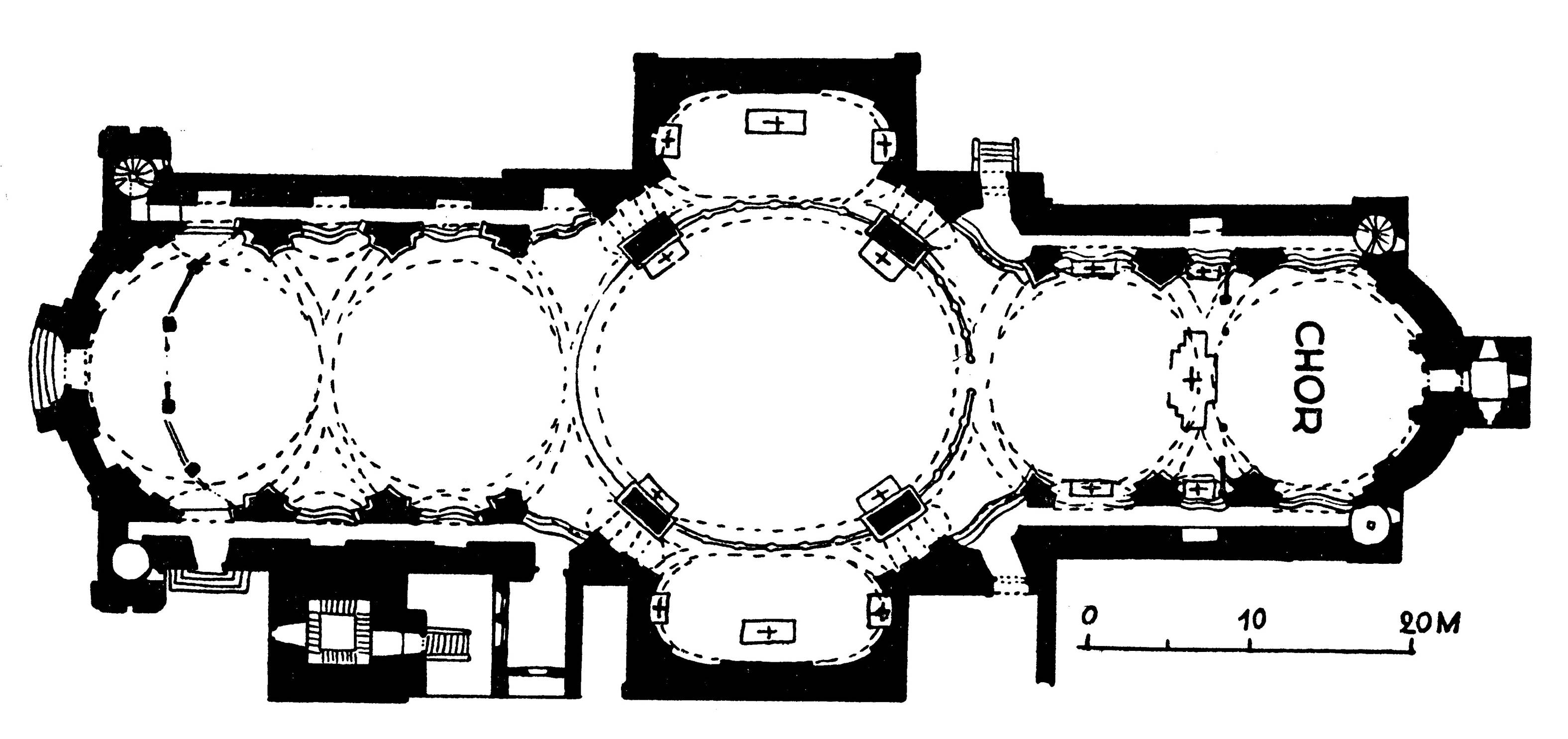 Grundriss der Benediktinerklosterkirche Hl. Kreuz in Neresheim